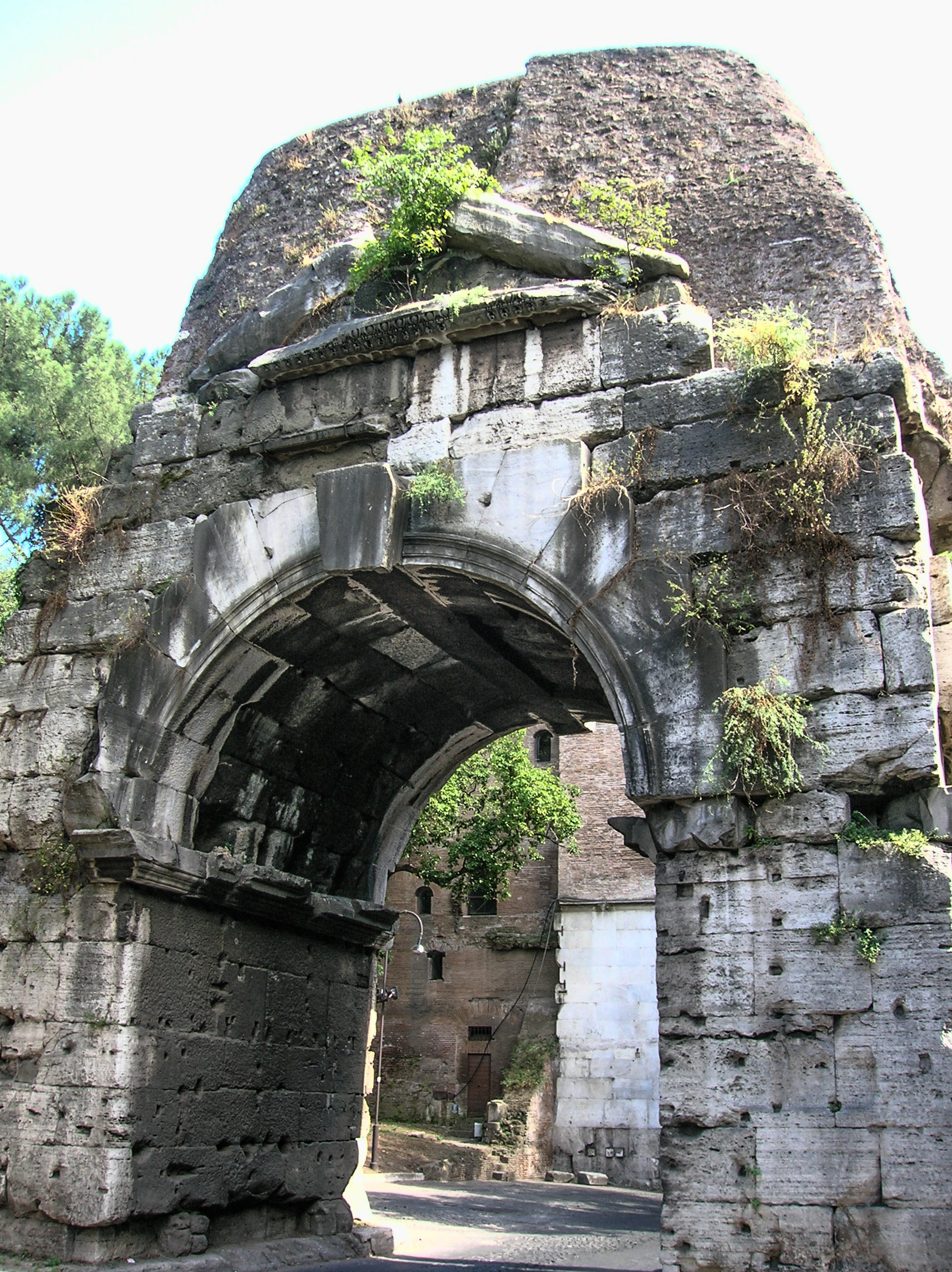 Arco di Druso, facciata interna (verso la città)